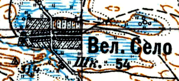 Топографическая карта Ленинградской области, квадрат Vc-29 (Батецкая), деревня Великое Село